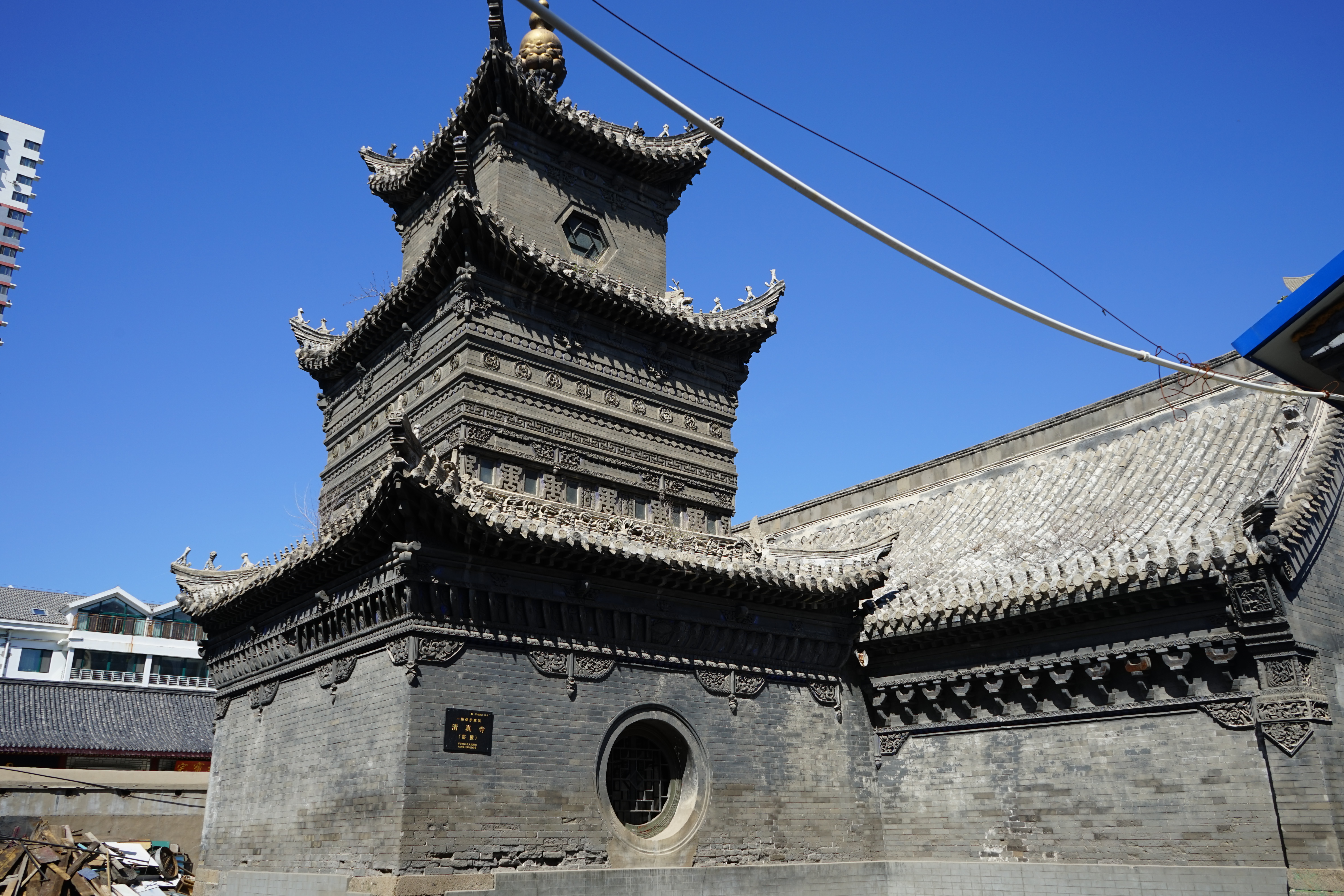 中文（中国大陆）: 卜奎清真寺 窑殿 2017